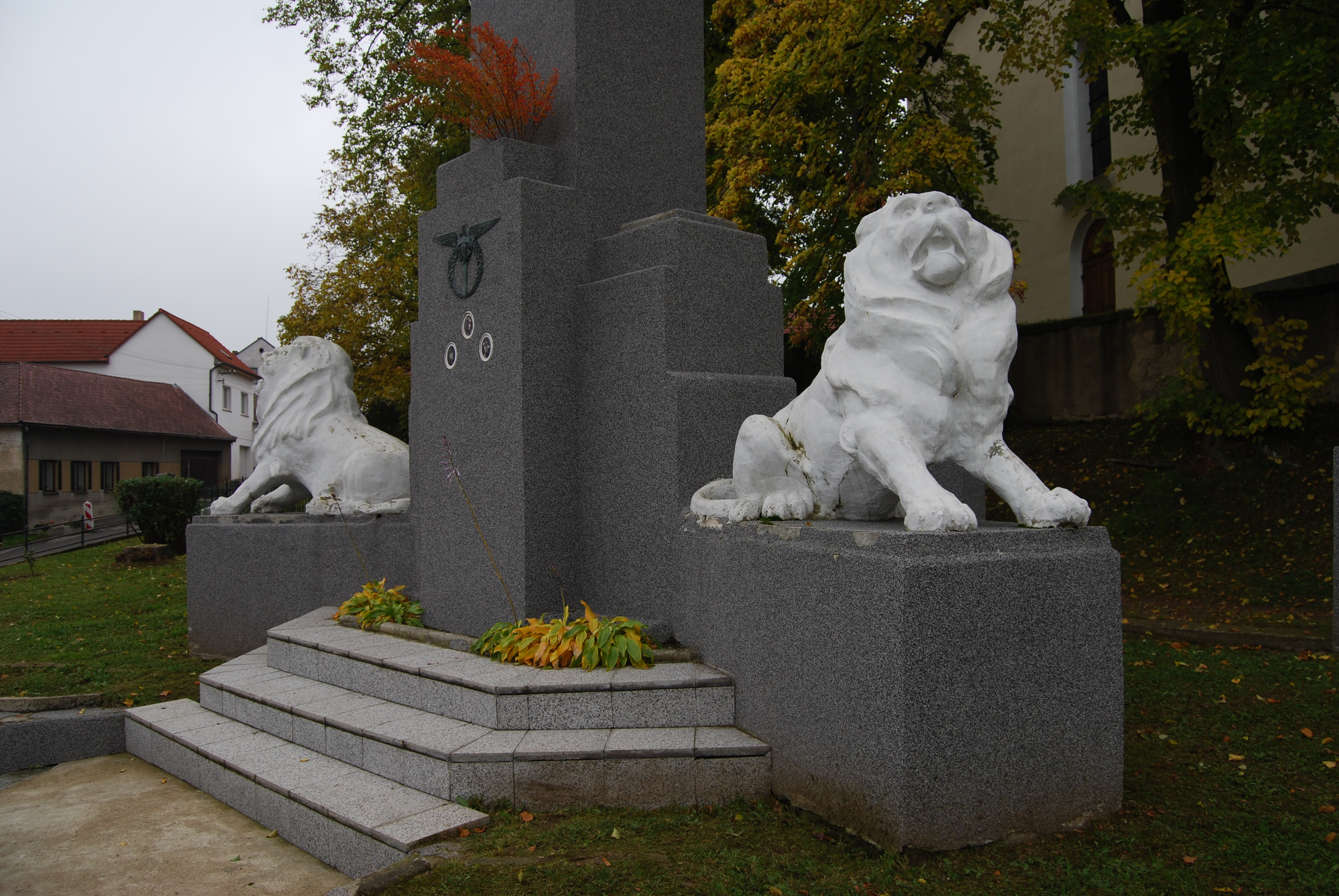 Pietní pomník obětem vojenské letecké tragedie z roku 1929 u vrchu Chlum. Krásná Hora nad Vltavou. Okres Příbram. Česká republika.